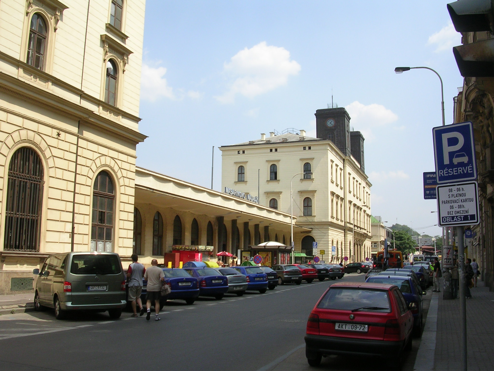 Masarykovo nádraží, průčelí v Hybernské ulici v pohledu od ulice Dlážděné.